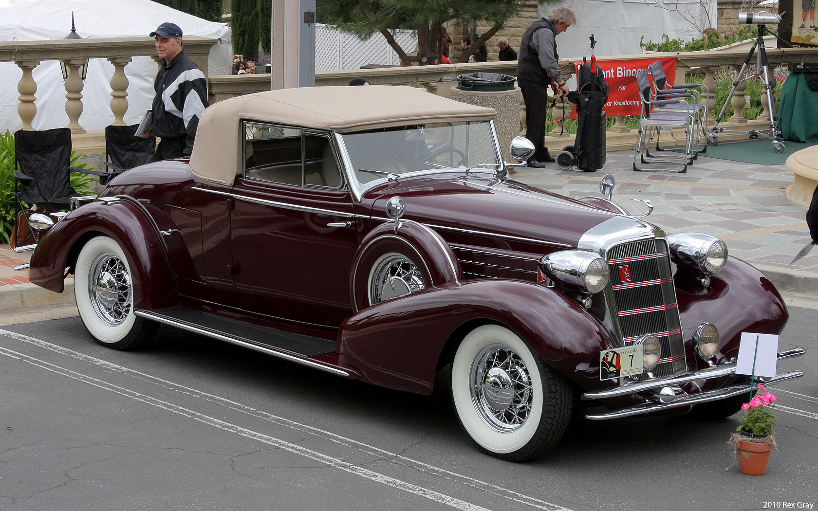 1934 Cadillac 355D